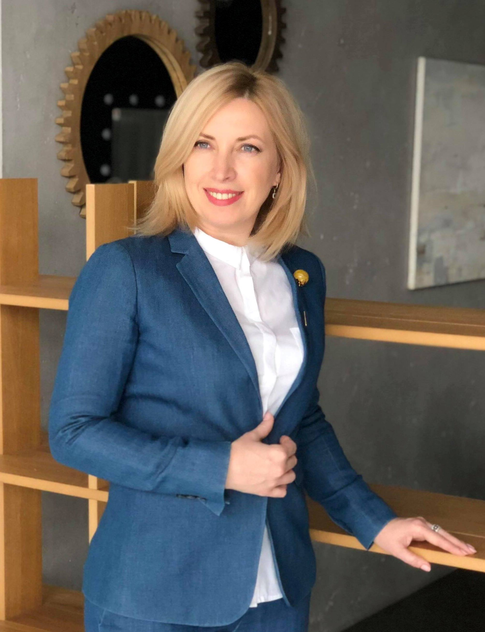 Iryna Vereshchuk5